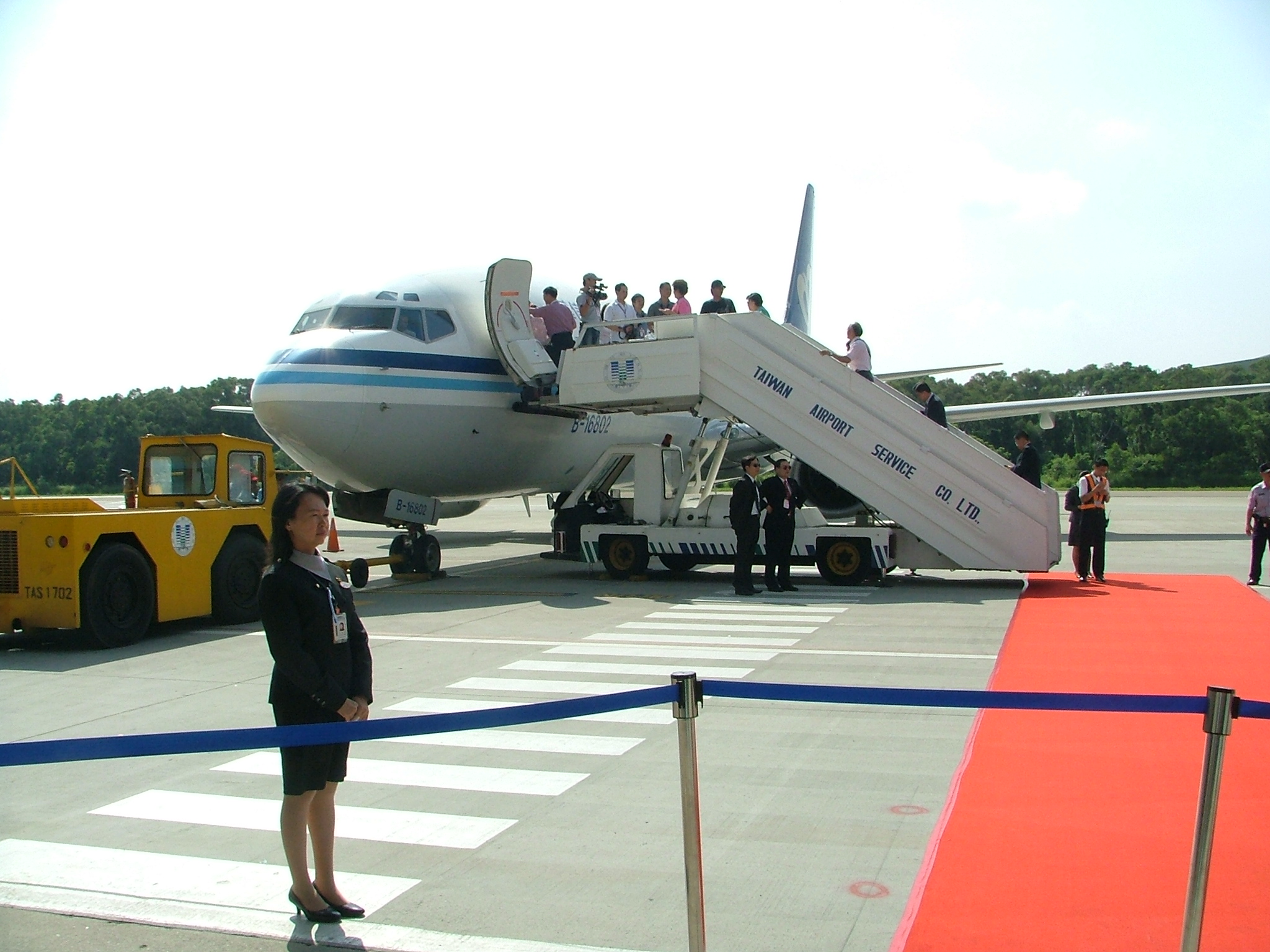 清泉崗機塲 廈門首航班機